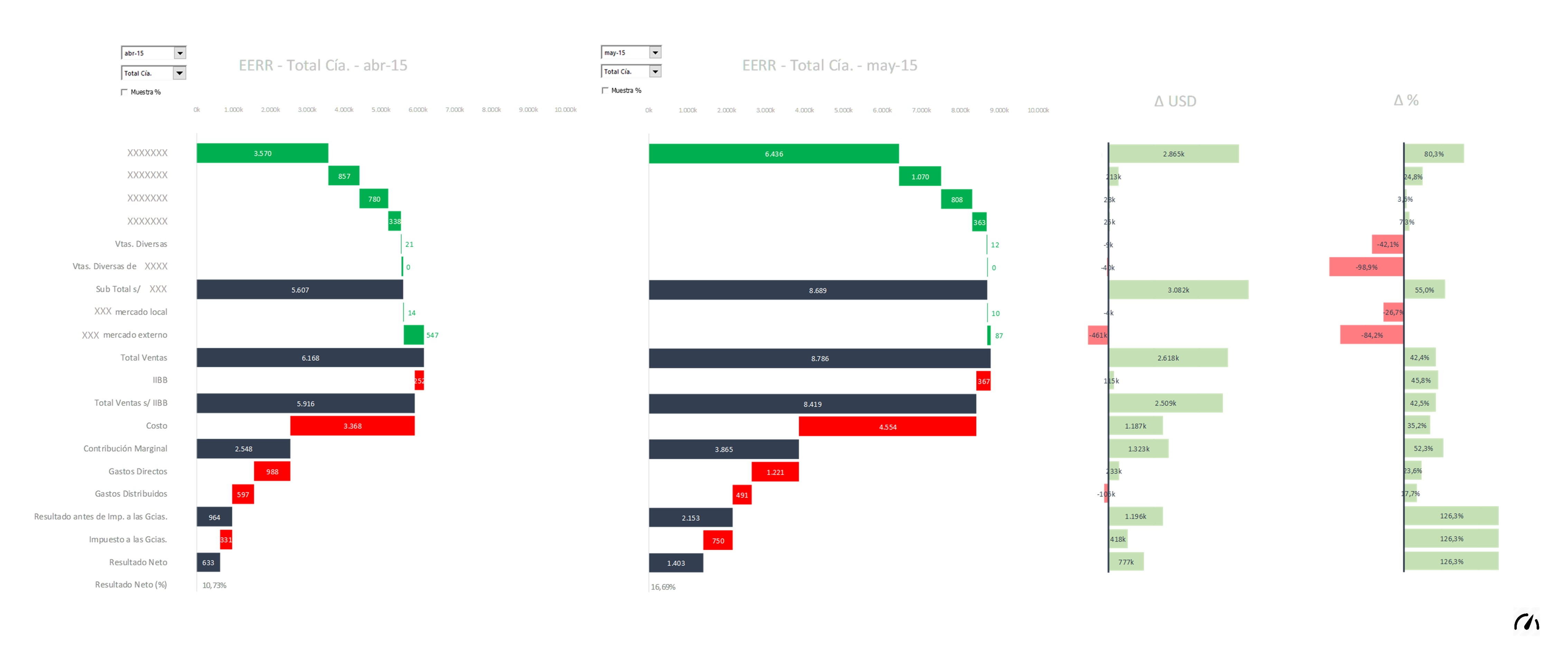 EERR Ejemplo de Visualización Comparativa en MS Excel (by Adrián Chiogna)